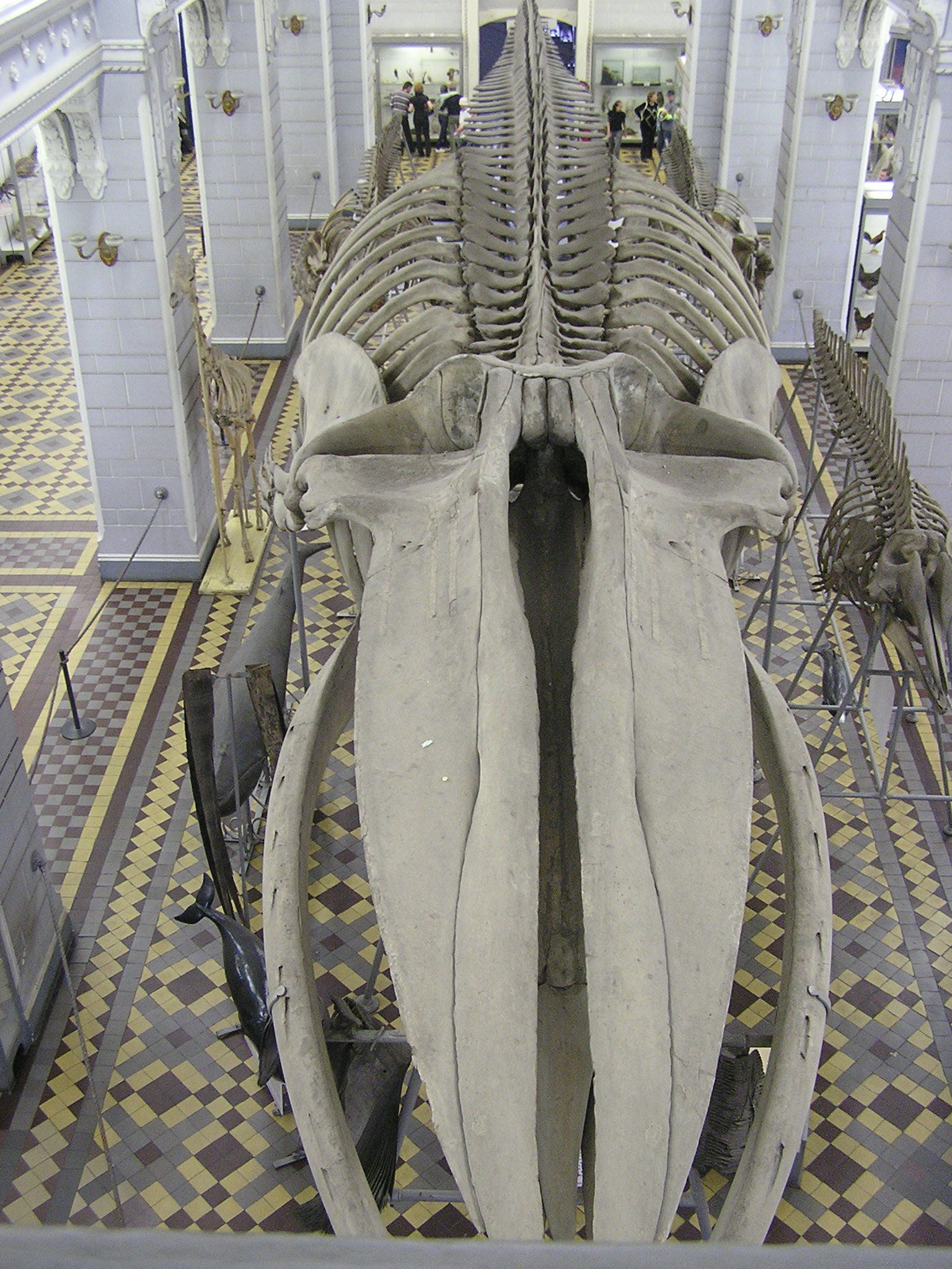 Зоологический музей в Санкт-Петербурге. Скелет синего кита